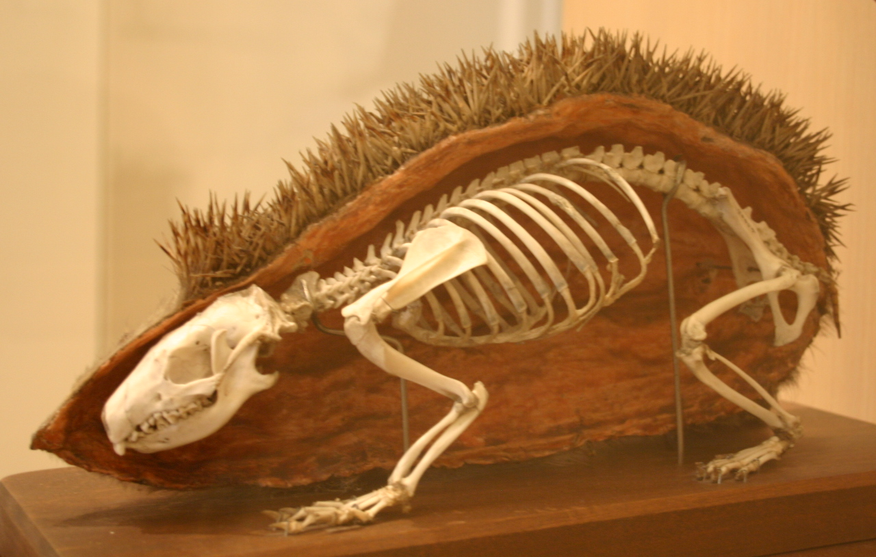 hedgehog